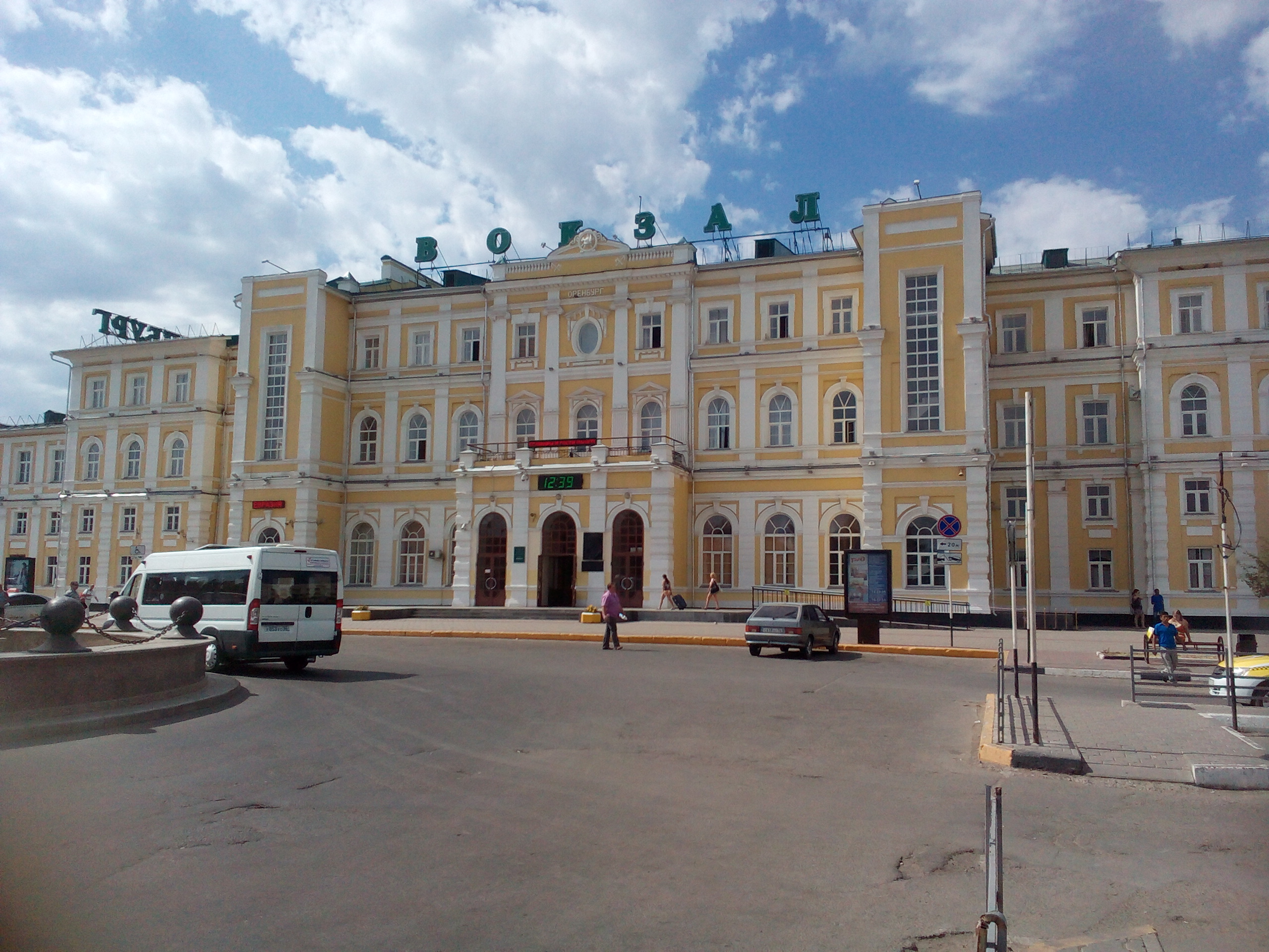 Вокзал железнодорожный: площадь Привокзальная, Оренбург, Оренбургская область